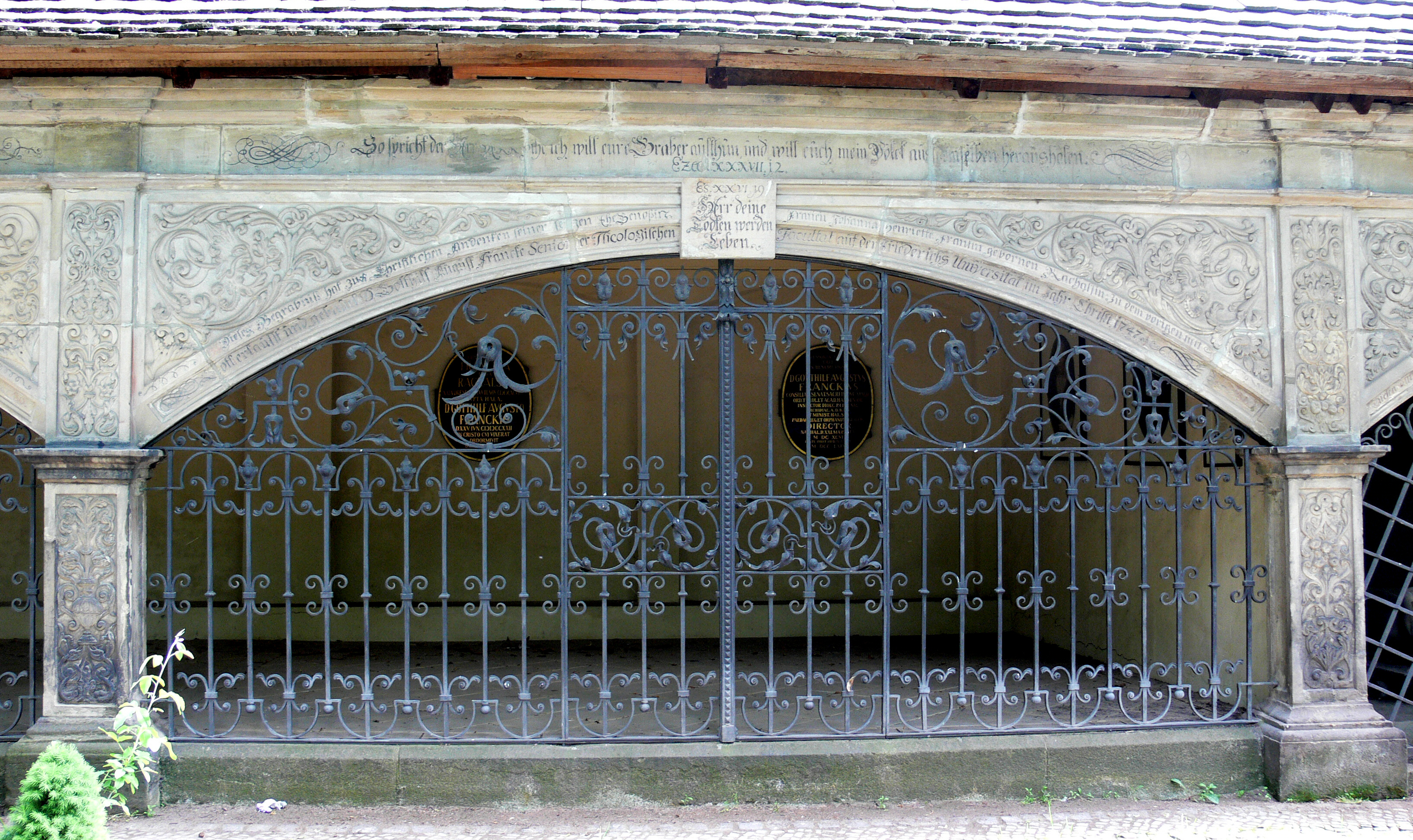 Stadtgottesacker, Begräbnis August Hermann Francke und Johann Anastasius Freylinghausen, Halle an der Saale